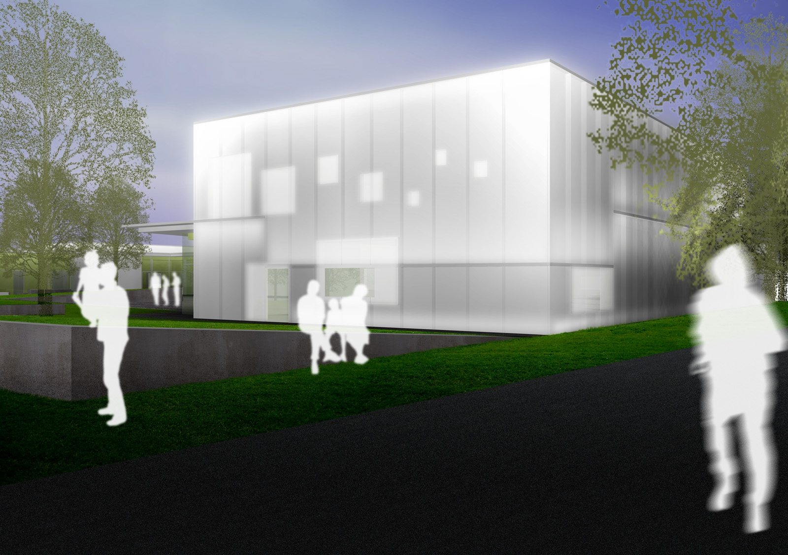 Rendering Neubau Baptisten-Kirche Dormagen